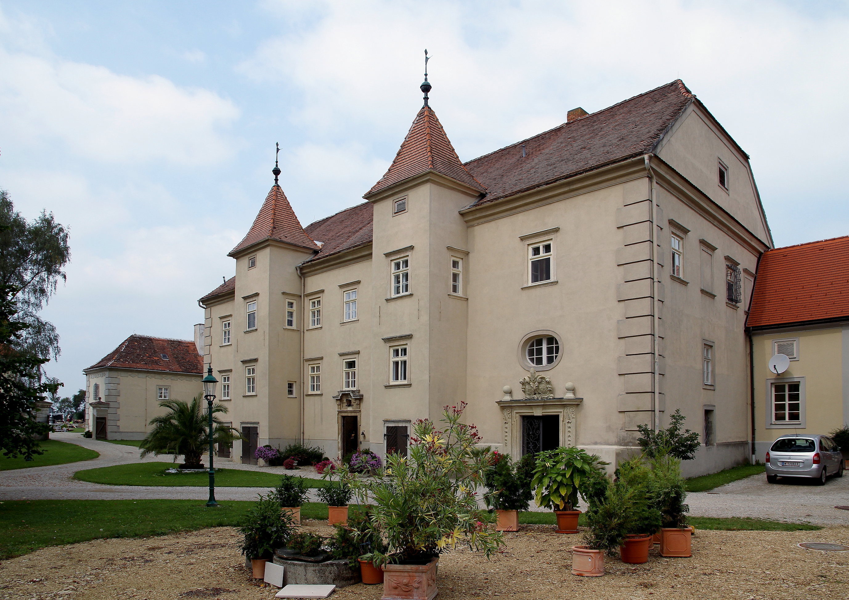 Schloss Gurhof in Gansbach, ein Ortsteil der niederösterreichischen Gemeinde Dunkelsteinerwald. Ein weitläufiger Komplex, dessen erster Bau 1483 bis 1493 errichtet wurde. Von 1948 bis 1968 war darin eine Strafvollzugsanstalt untergebracht und ist seither in privater Nutzung.